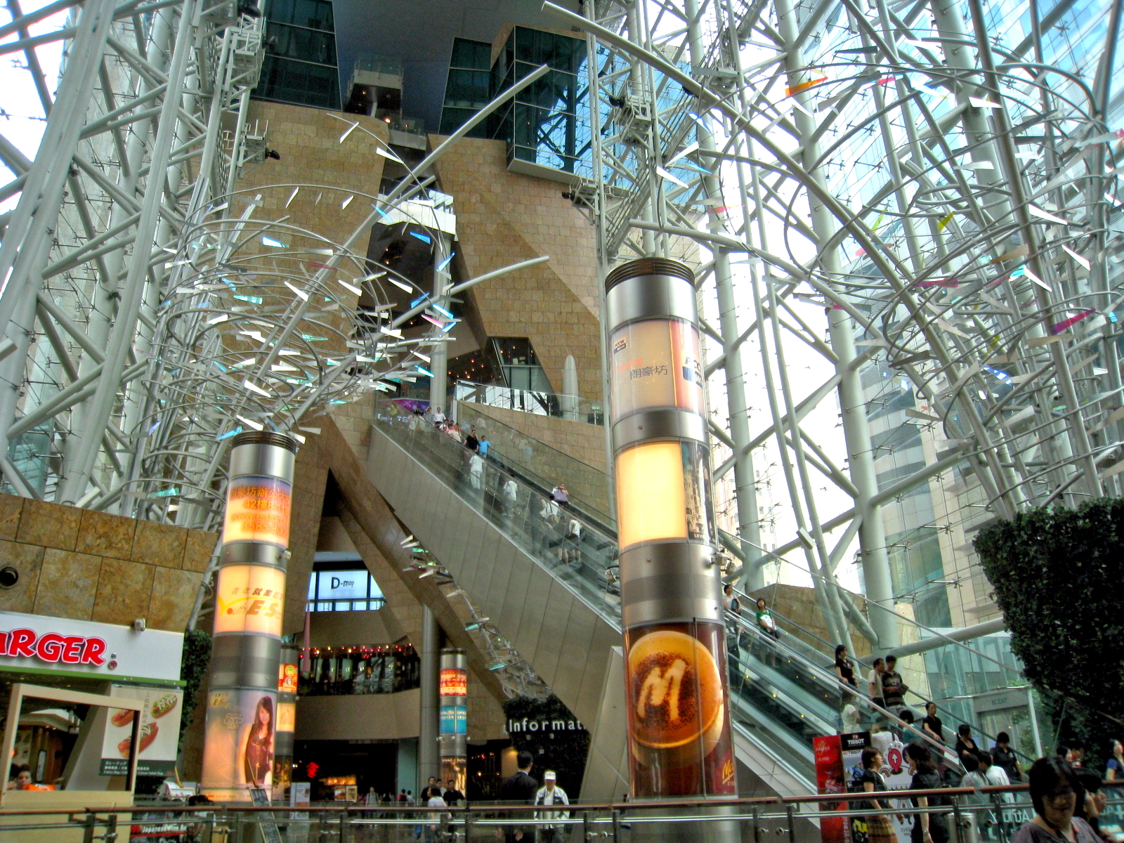 Langham Place Void 朗豪坊通天廣場